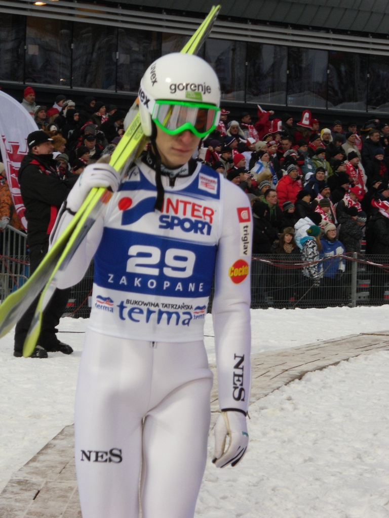 Jurij Tepes